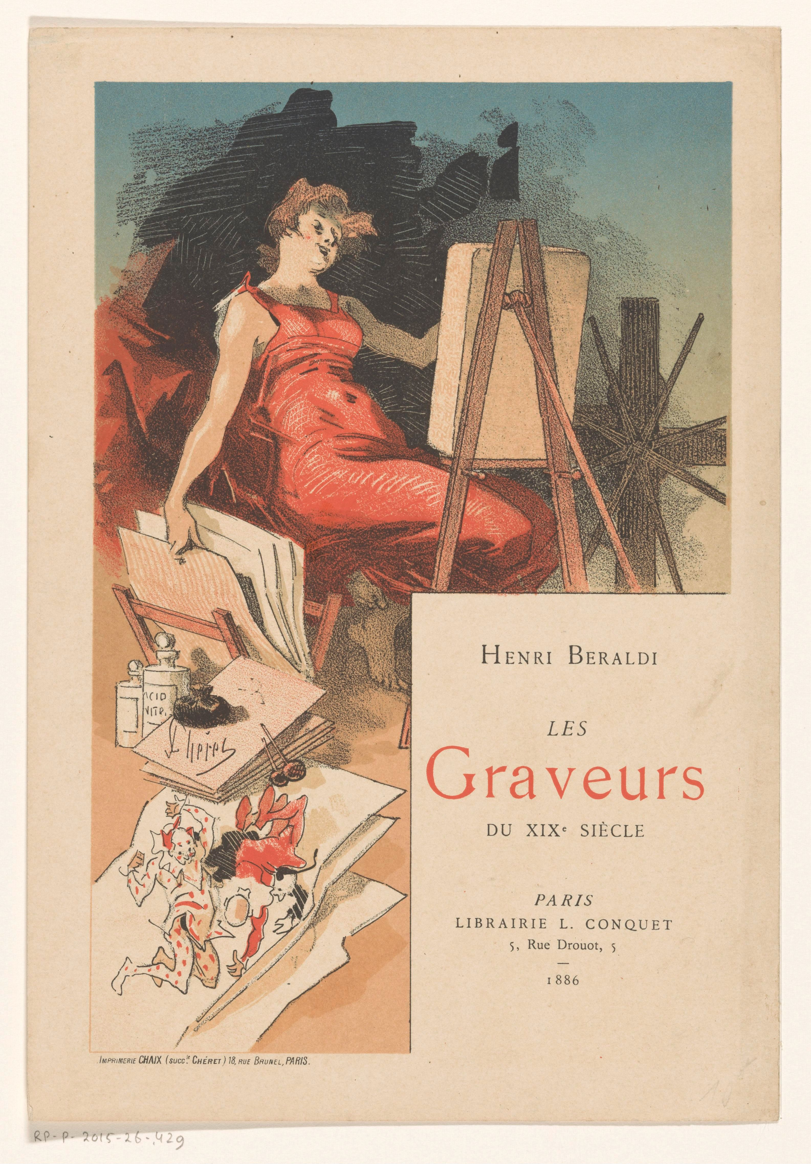 IdentificatieTitel(s): Vrouw omringd door gereedschappen en materialen van een prentmakerObjecttype: prent omslag Objectnummer: RP-P-2015-26-429Opschriften / Merken: verzamelaarsmerk, verso, gestempeld: Lugt 2228verzamelaarsmerk, verso, gestempeld: Lugt 4779Omschrijving: Vrouw gezeten achter een ezel met daarop lithosteen, in de achtergrond een drukpers. Op de voorgrond een prentstandaard, potten met etswater, een inktstempel, twee burijnen en een stapel papier.VervaardigingVervaardiger: prentmaker: Jules Chéret (vermeld op object)naar ontwerp van: Jules Chéret (vermeld op object)drukker: Edmond Chaix (vermeld op object)uitgever: Léon Conquet (vermeld op object)Plaats vervaardiging: ParijsDatering: 1886Fysieke kenmerken: kleurenlithografieMateriaal: papier Techniek: kleurenlithografie (procedé)Afmetingen: blad: h 240 mm × b 165 mmToelichtingOmslag voor: Béraldi, Henri. Les graveurs du XIXe siècle. Paris: Léon Conquet, 1886.OnderwerpWat: tools, implements of graphic artisteaselprinting pressartist at work, in his workshop (+ graphic arts)Verwerving en rechtenCredit line: Legaat van de heer S. Emmering, AmsterdamVerwerving: legaat 2000Copyright: Publiek domein